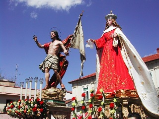 Un momento dell'Affruntata durante la Settimana Santa di Polistena.